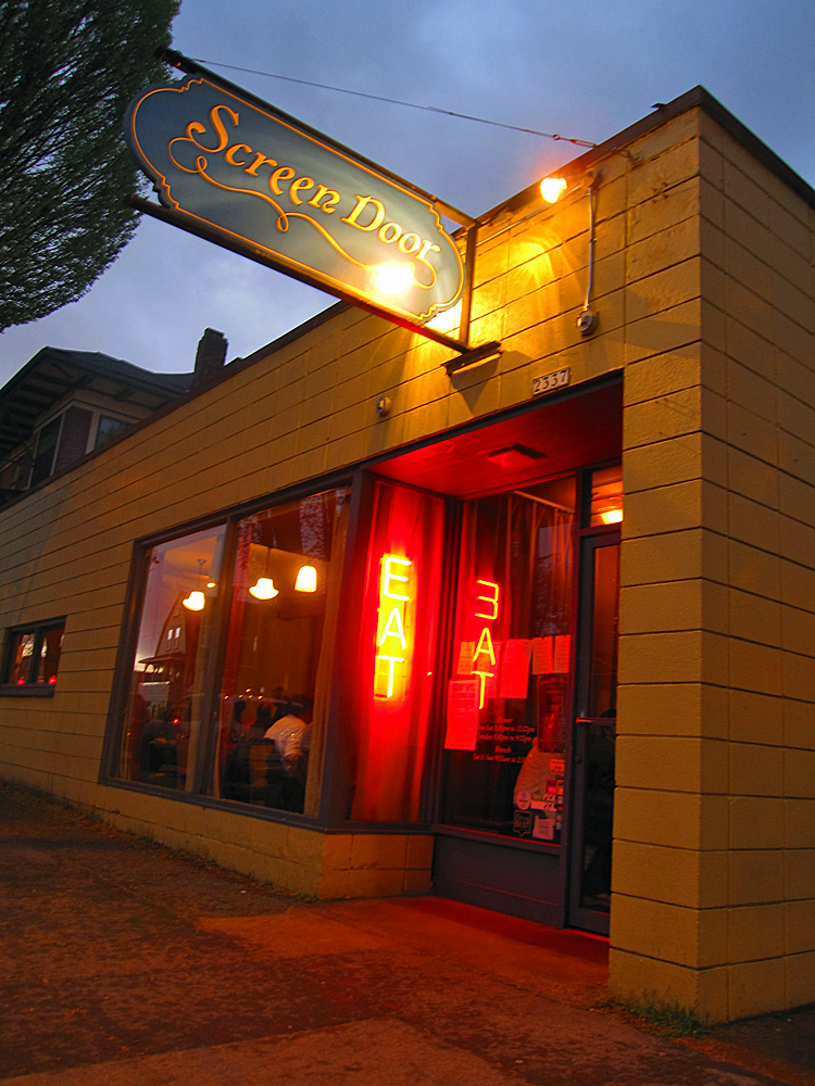 Screen Door restaurant in Portland, Oregon.